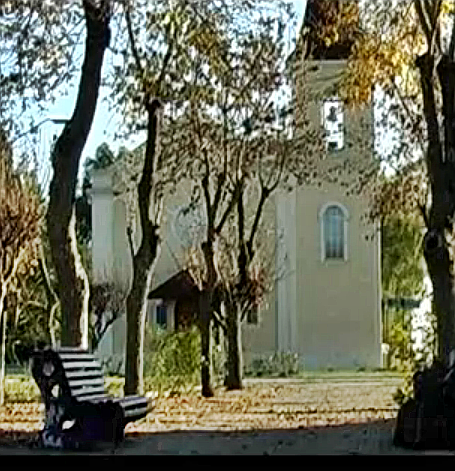 Parroquia y plaza de Chamizo Uruguay. La iglesia está dedicada a Santa Teresita.